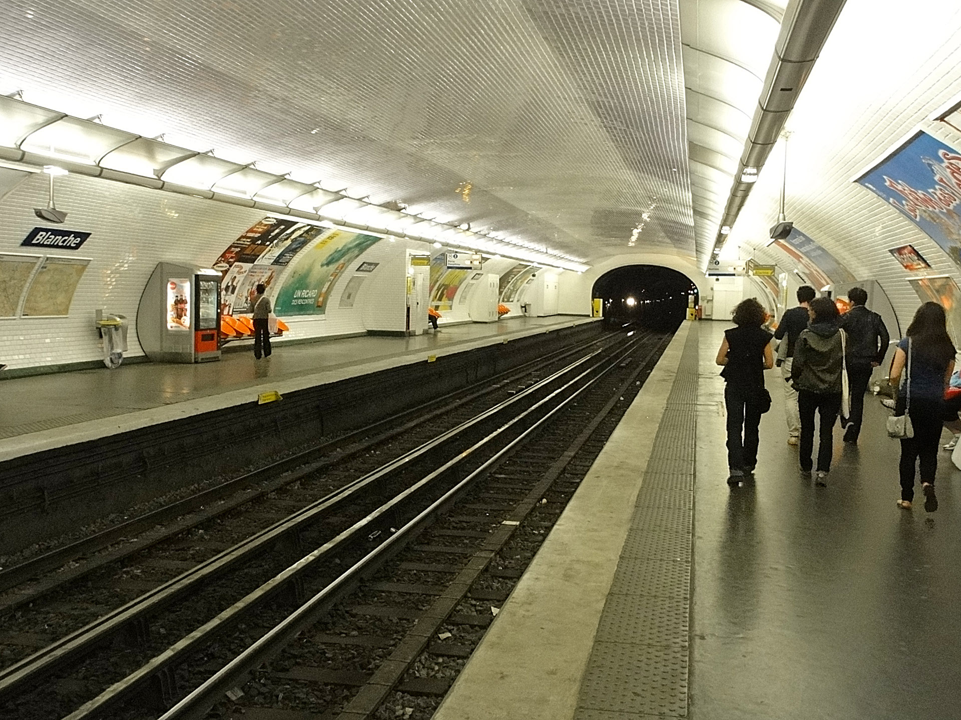 Station Blanche de la ligne 2 du métro de Paris, France.